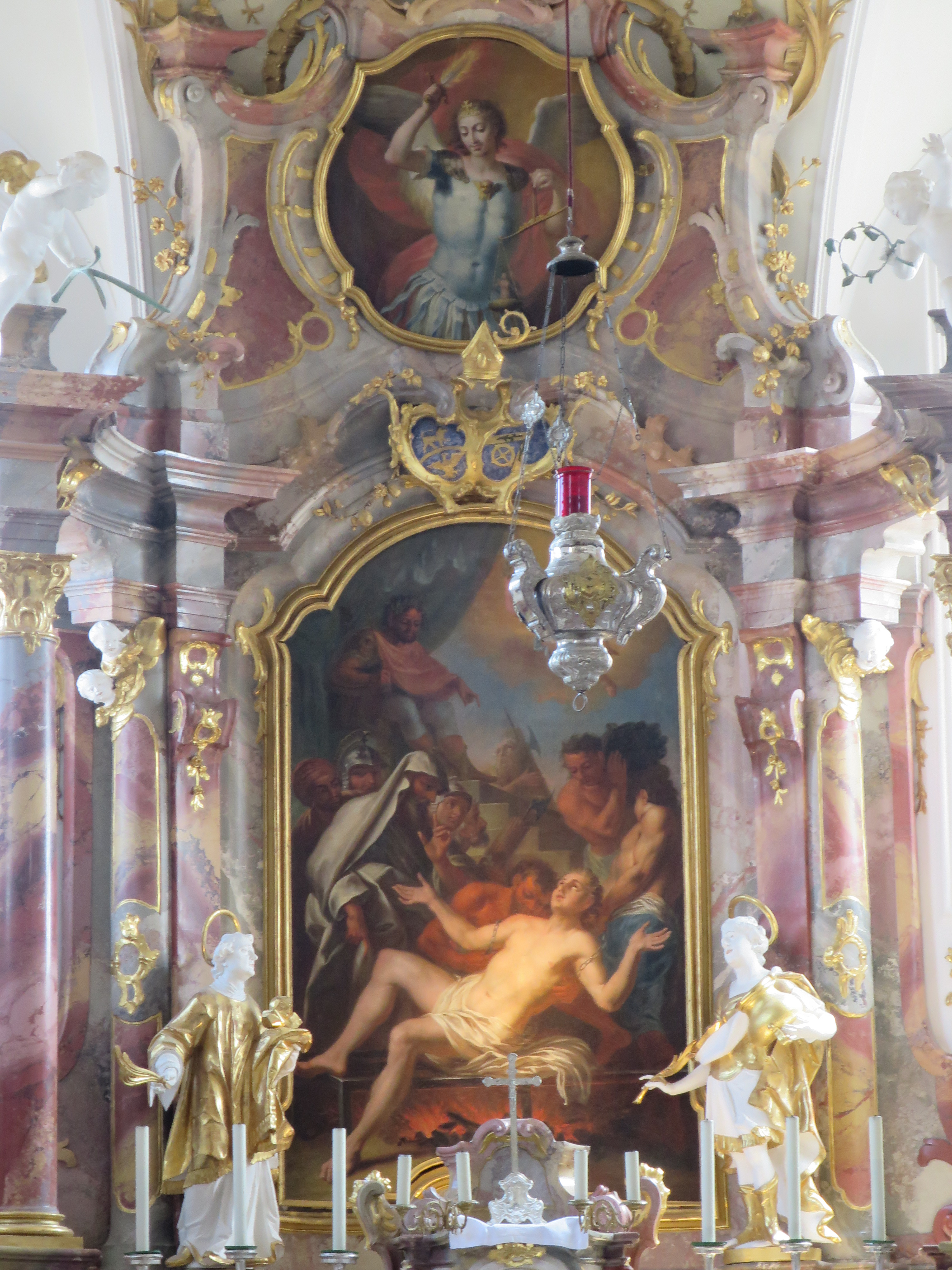 Hochaltar von T. Zöpf, Marter des Hl. Laurentius. Im Auszug Erzengel Michael.